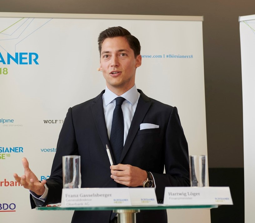 Chefredakteur des Börsianer Magazins Dominik Hojas